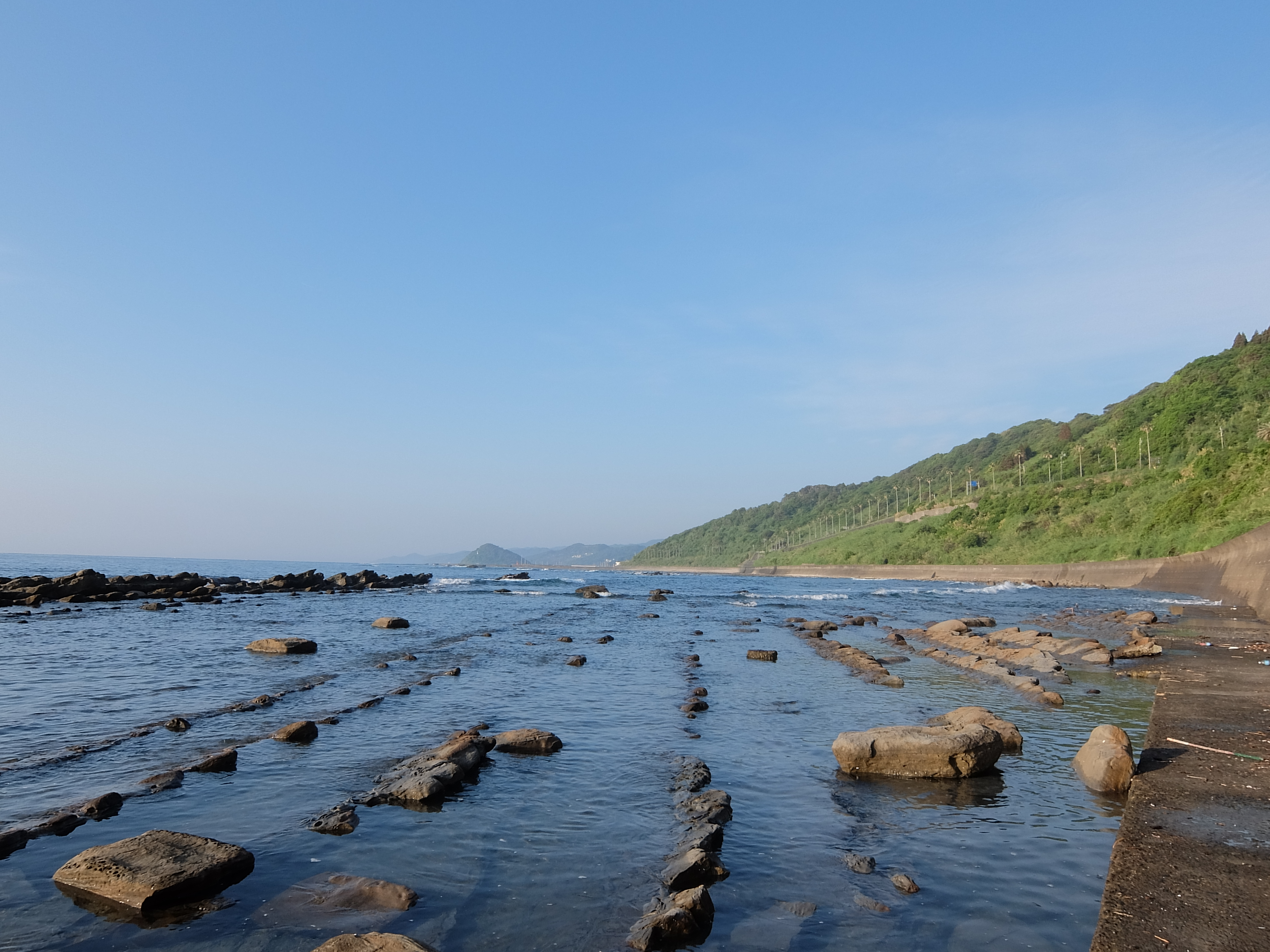 日南海岸 堀切峠・道の駅フェニックス付近